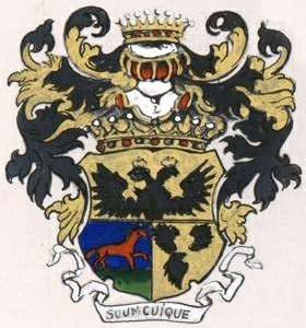 Diebitsch-Zabalkanski suguvõsa krahvivapp